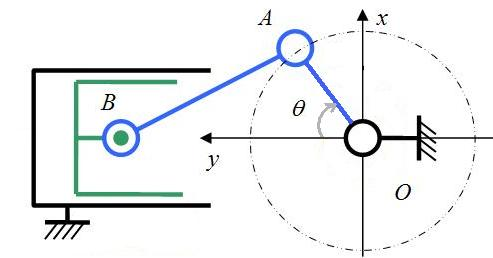 Schéma technologique. Position relative de l'axe de piston et de la surface de guidage avec la chemise. Theta désigne l'avance à l'allumage